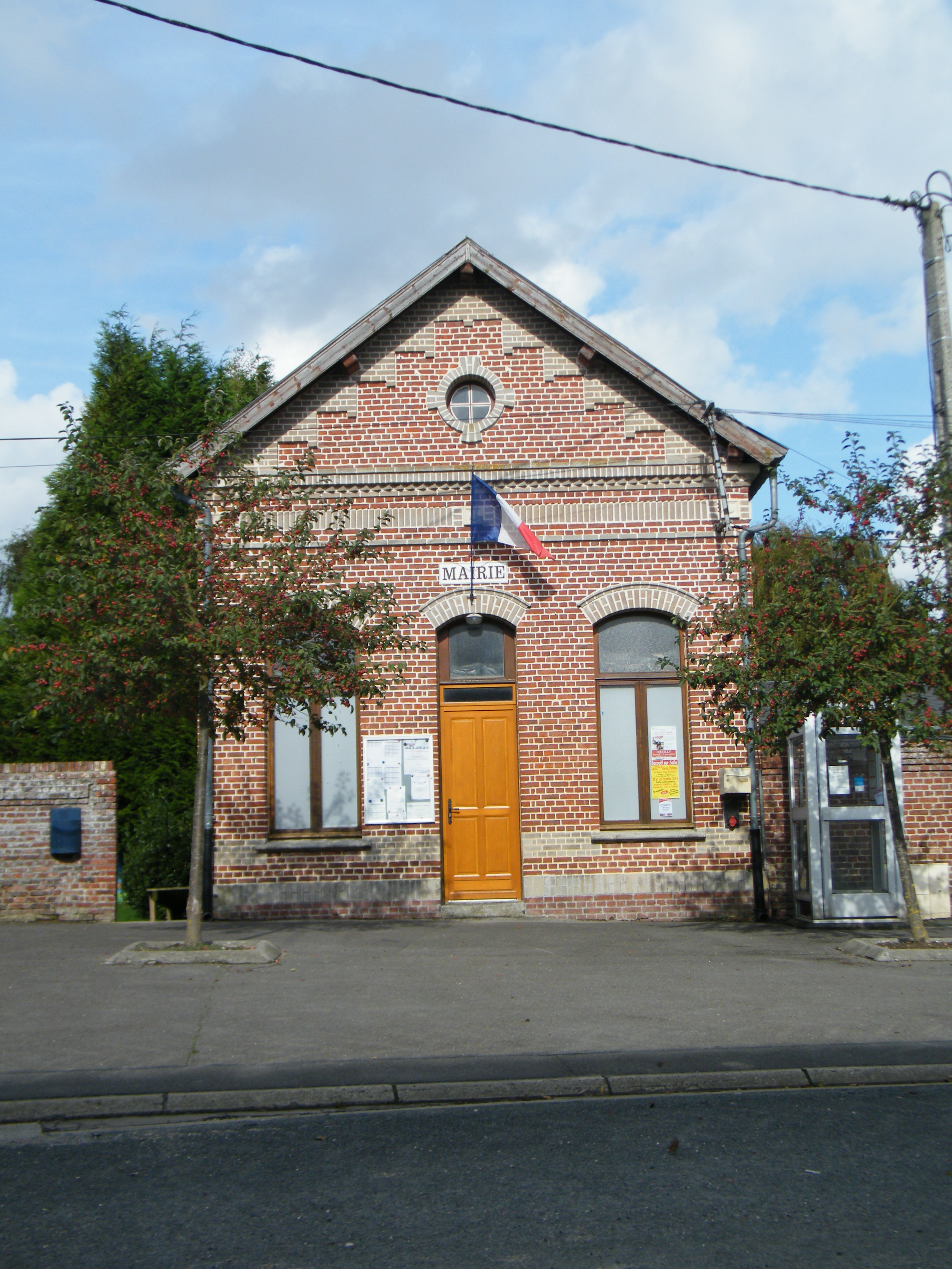 Mairie.